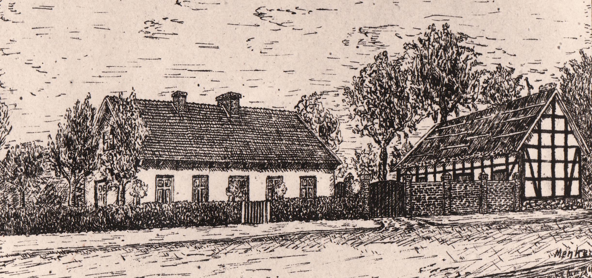 Szkoła w Gleźnowie.